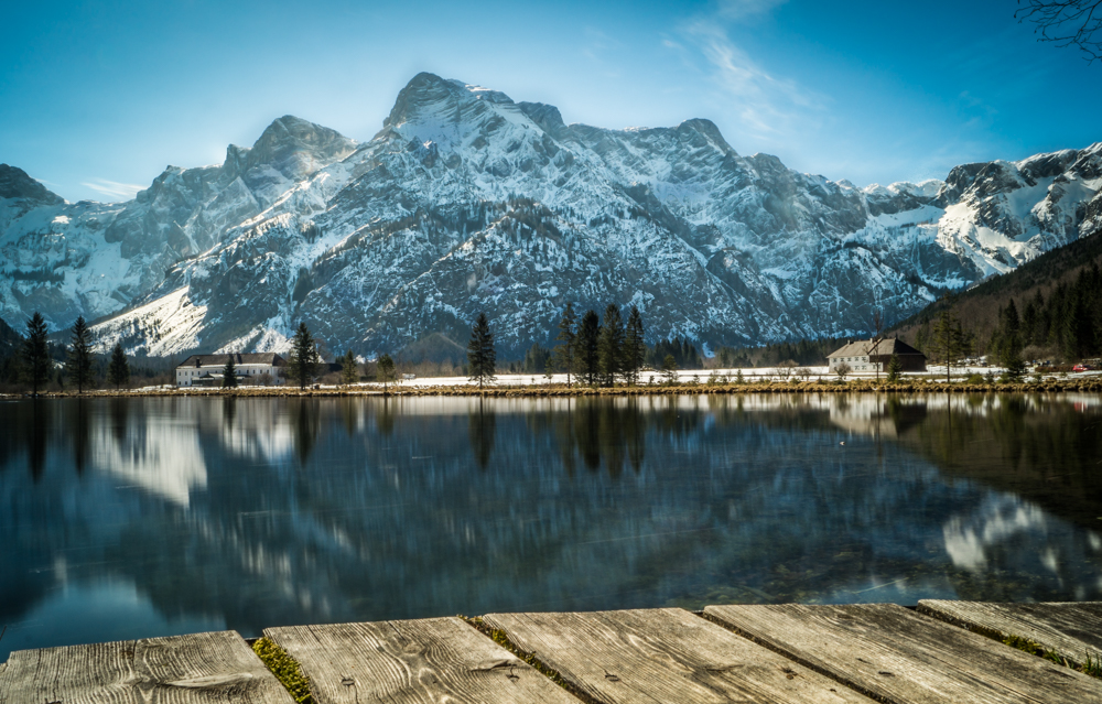 Almsee This media shows the nature reserve in Upper Austria with the ID n149.